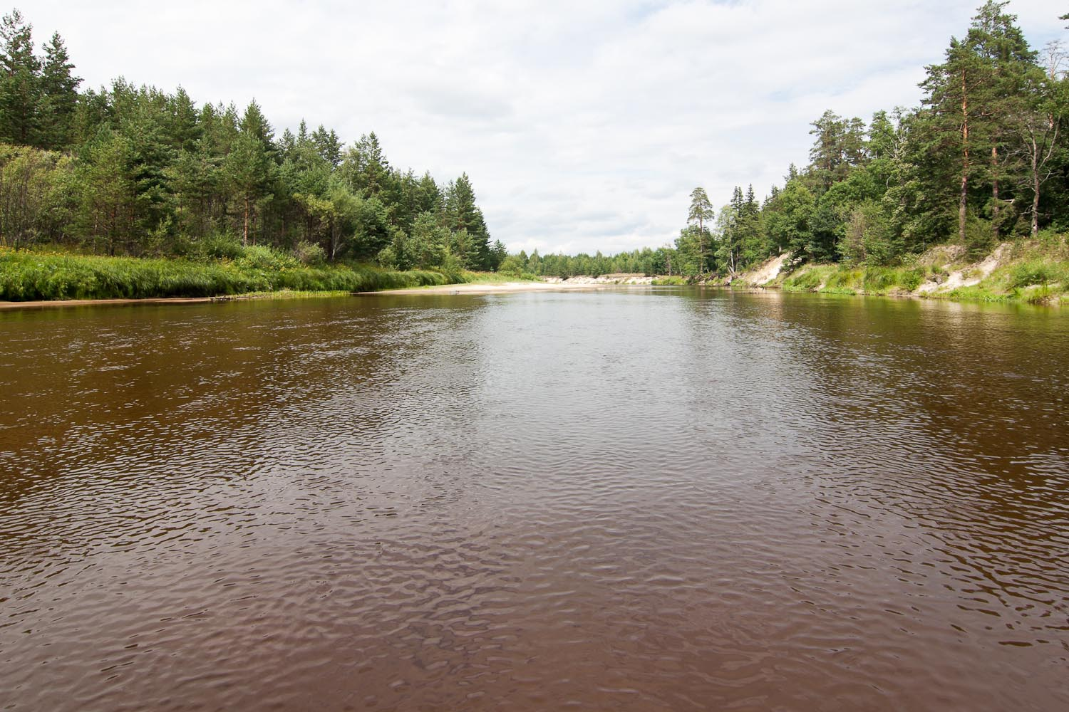 р.Лух (2011.07.31)